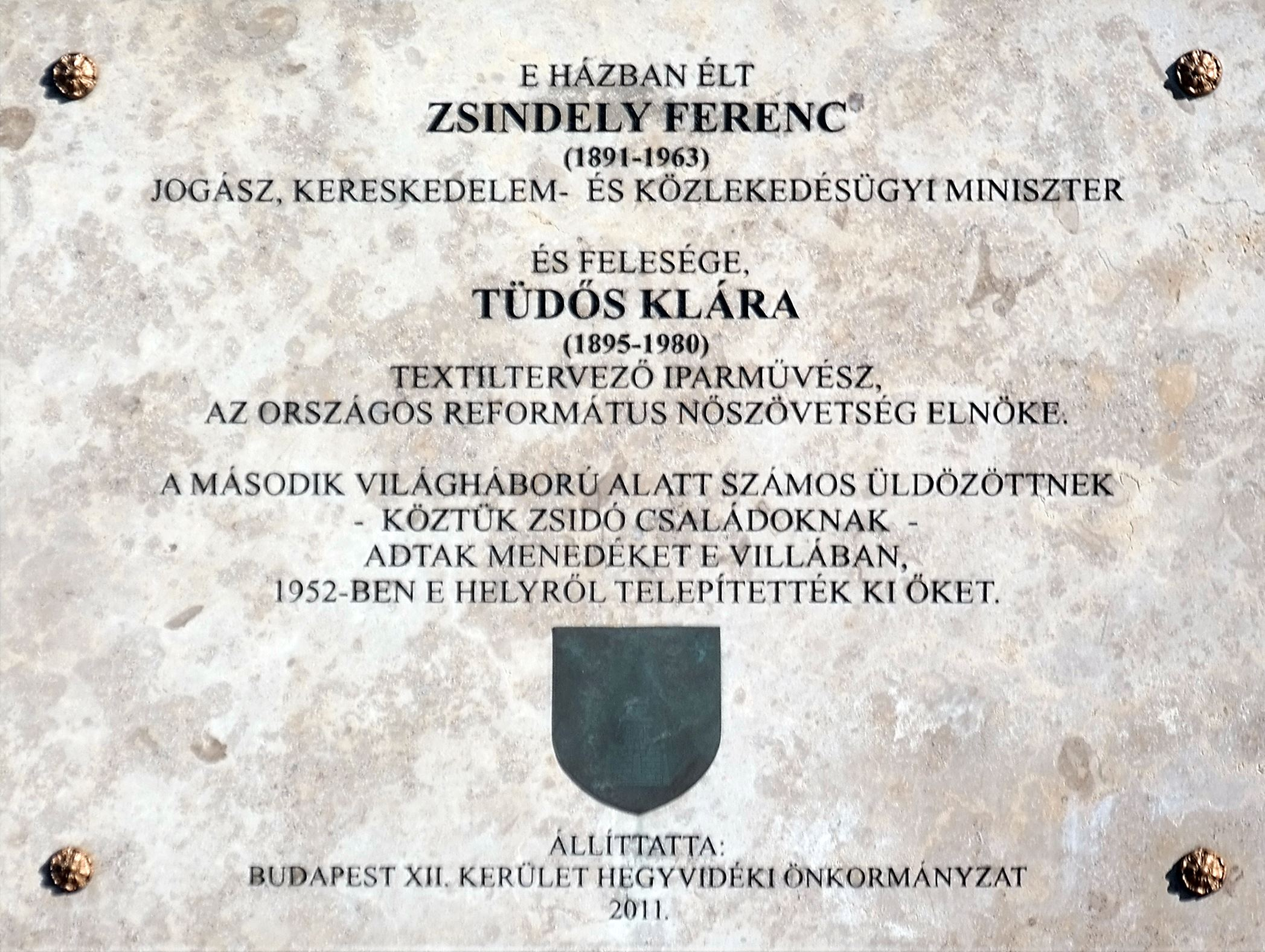 Zsindely Ferenc és felesége Tüdős Klára emléktáblája Budapest XII. kerületében. Istenhegyi út 92.